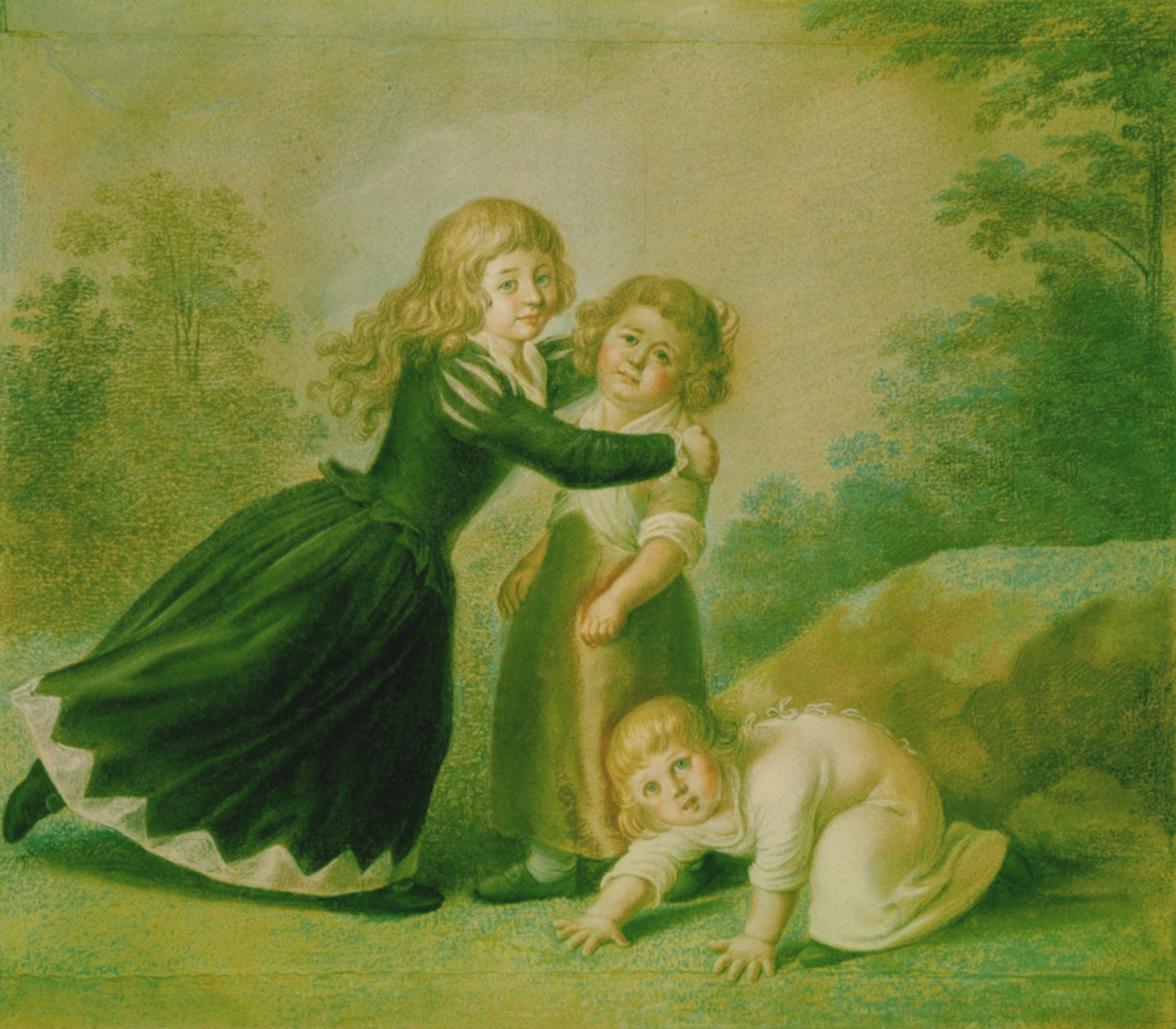 Daniel Chodowieki, drei Enkel des Künstlers, Pastell 1787